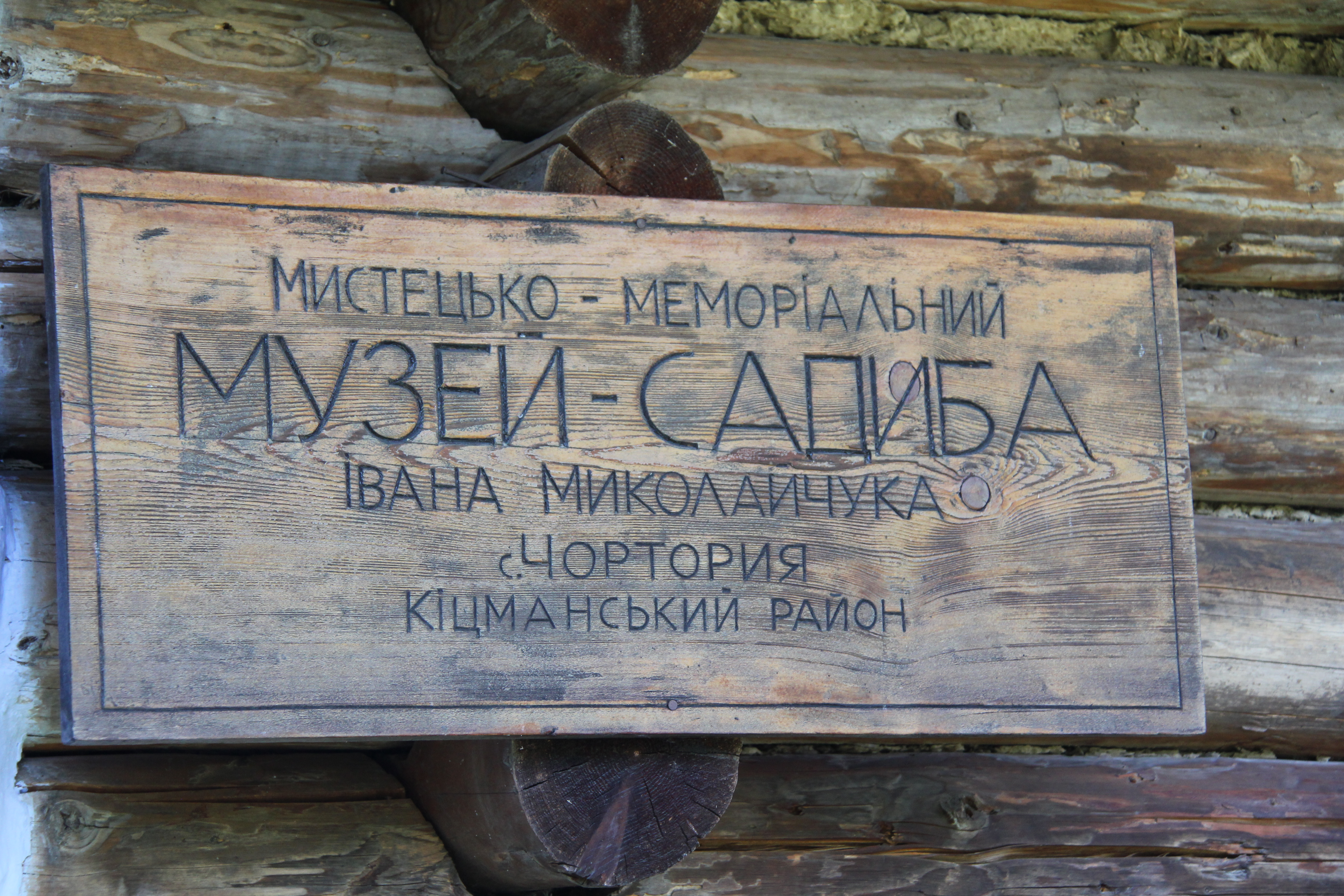 Хата-музей Івана Миколайчука у селі Чотория.